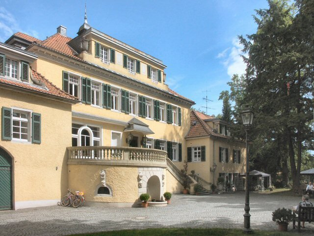 Eulenbroich castle in Rösrath